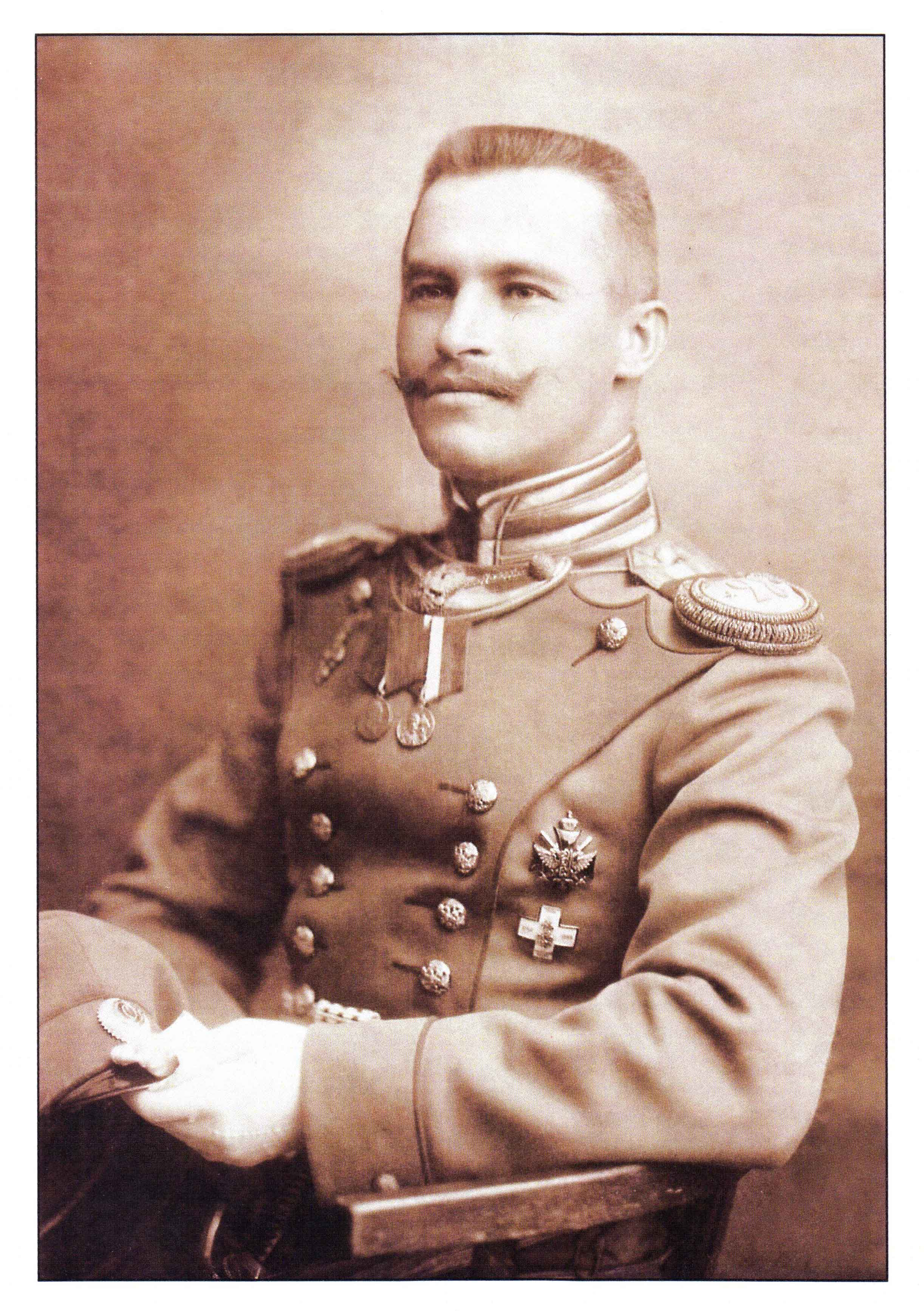 Фотограф Лещинский Михаил Яковлевич (1867-1927). Портрет поручика 28-го Полоцкого пехотного полка Льва Дионисьевича Лосиевского, сына почётного гражданина Харькова. Харьков. На груди у поручика с медалью «В память 300-летия царствования дома Романовых» (1913, правая центральная медаль, повторяющая серебряный юбилейный рубль 1913 года).